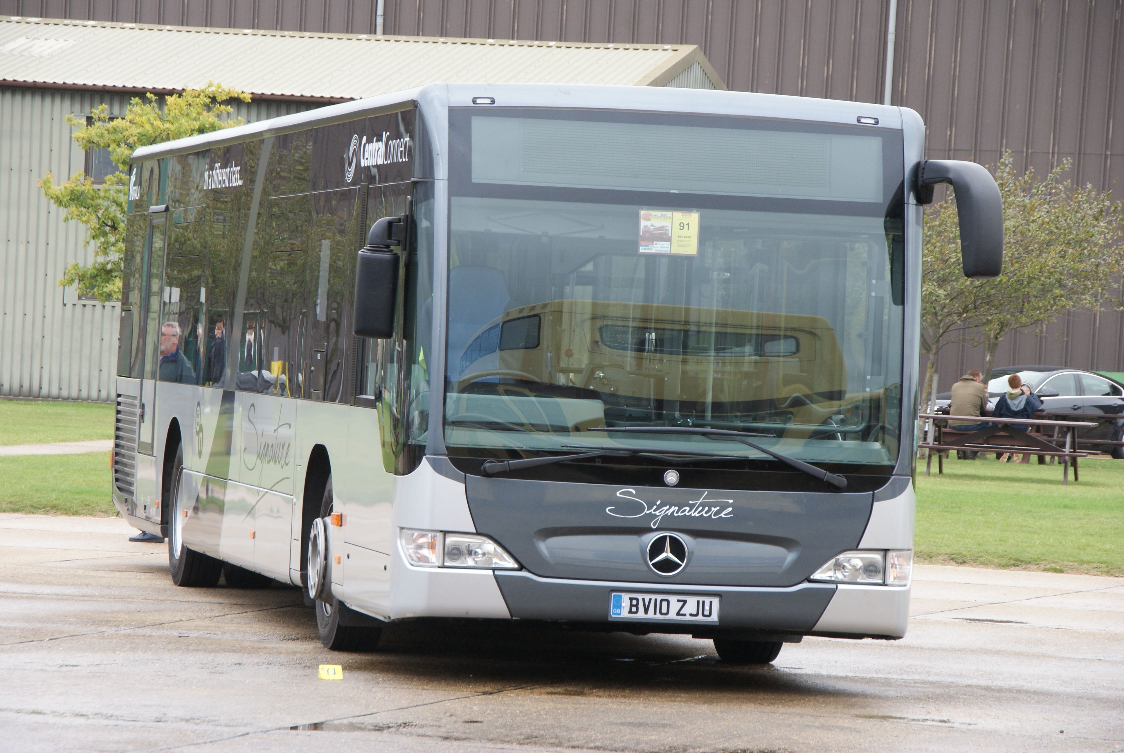 BV10ZJU 260910 CPS